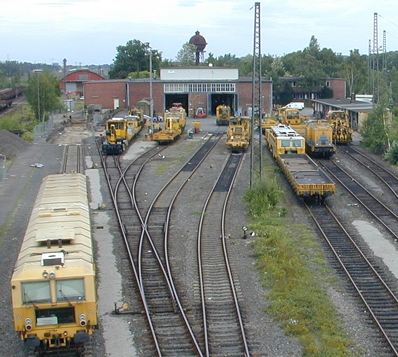 Bauzüge in der Nähe des Bahnhof Duisburg-Entenfang